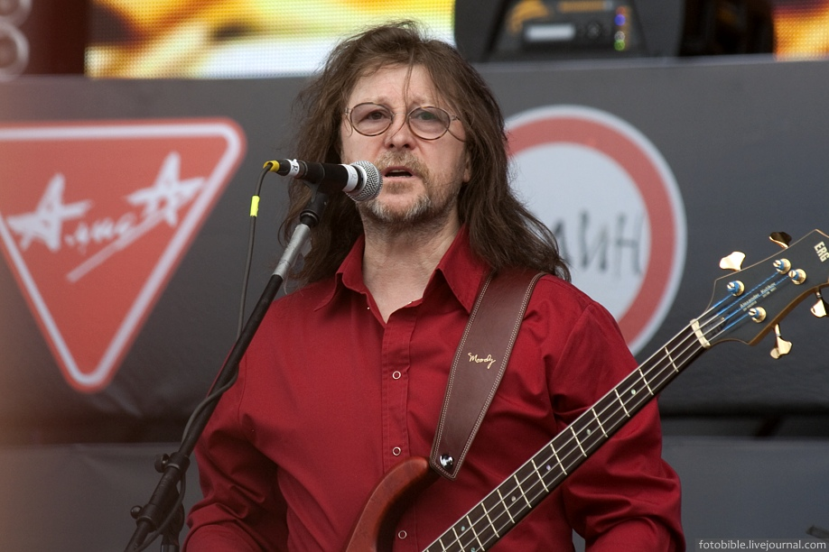 Александр Кутиков, "Машина времени". Фестиваль "Рок над Волгой 2010"